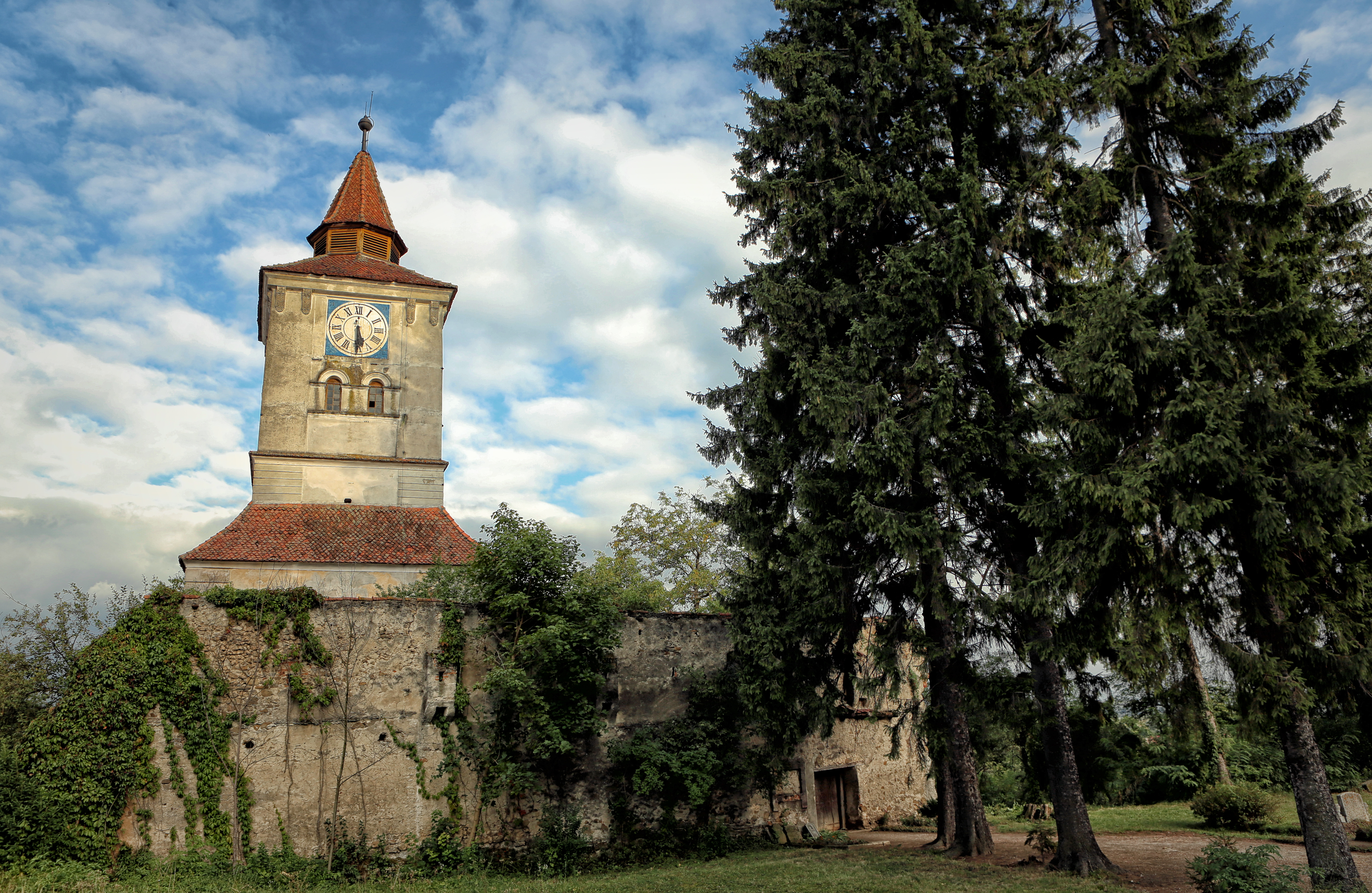 Biserica evanghelică 01